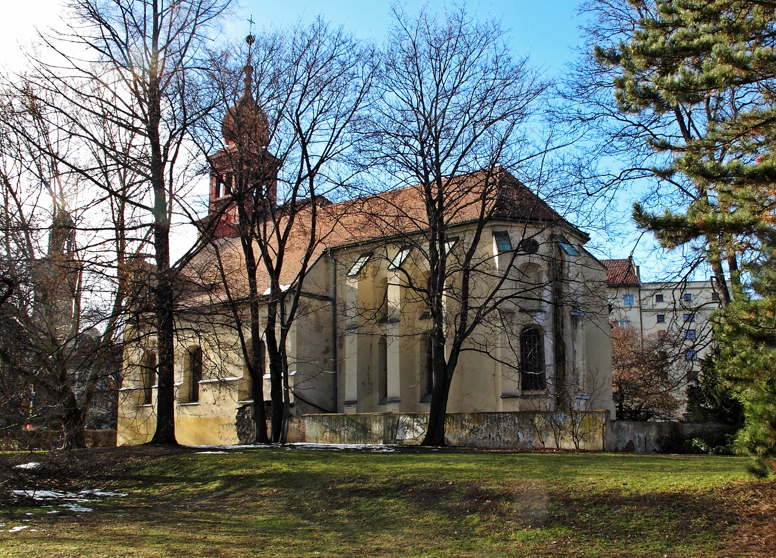 Kostel sv. Jana Křtitele (Opava), Hrnčířská, Opava